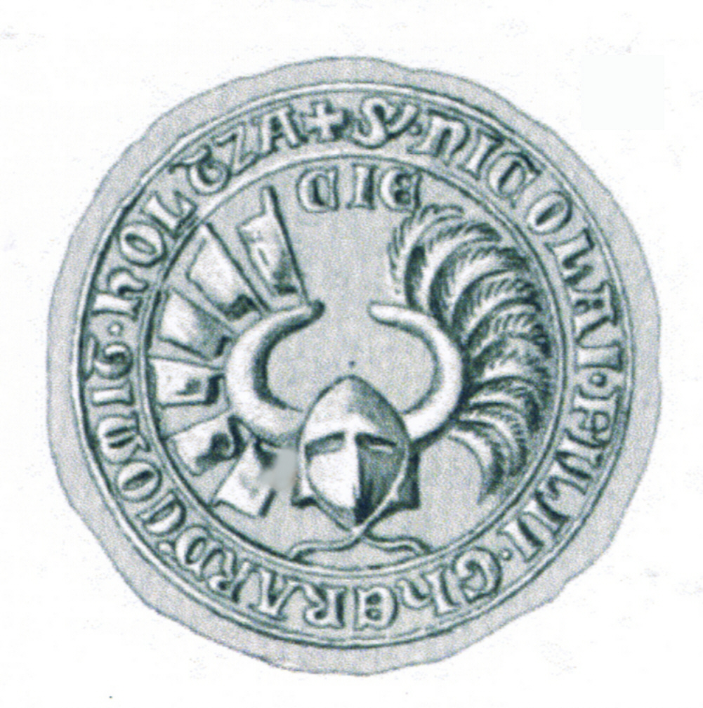 Siegel des Nikolaus von Holstein (auch Klaus von Holstein; * 1321; † 8. Mai 1397 in Itzehoe) war von 1390 bis 1397 Graf von Holstein-Rendsburg. Das Siegel stammt aus der Zeit um 1342-1343.